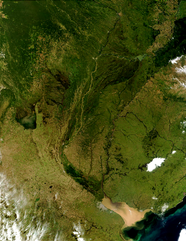 Cuenca del Río de la Plata. Se aprecian los ríos Paraná y Uruguay, límites de la Provincia de Entre Ríos. Foto tomada desde satélite durante las inundaciones de mayo de 2003.